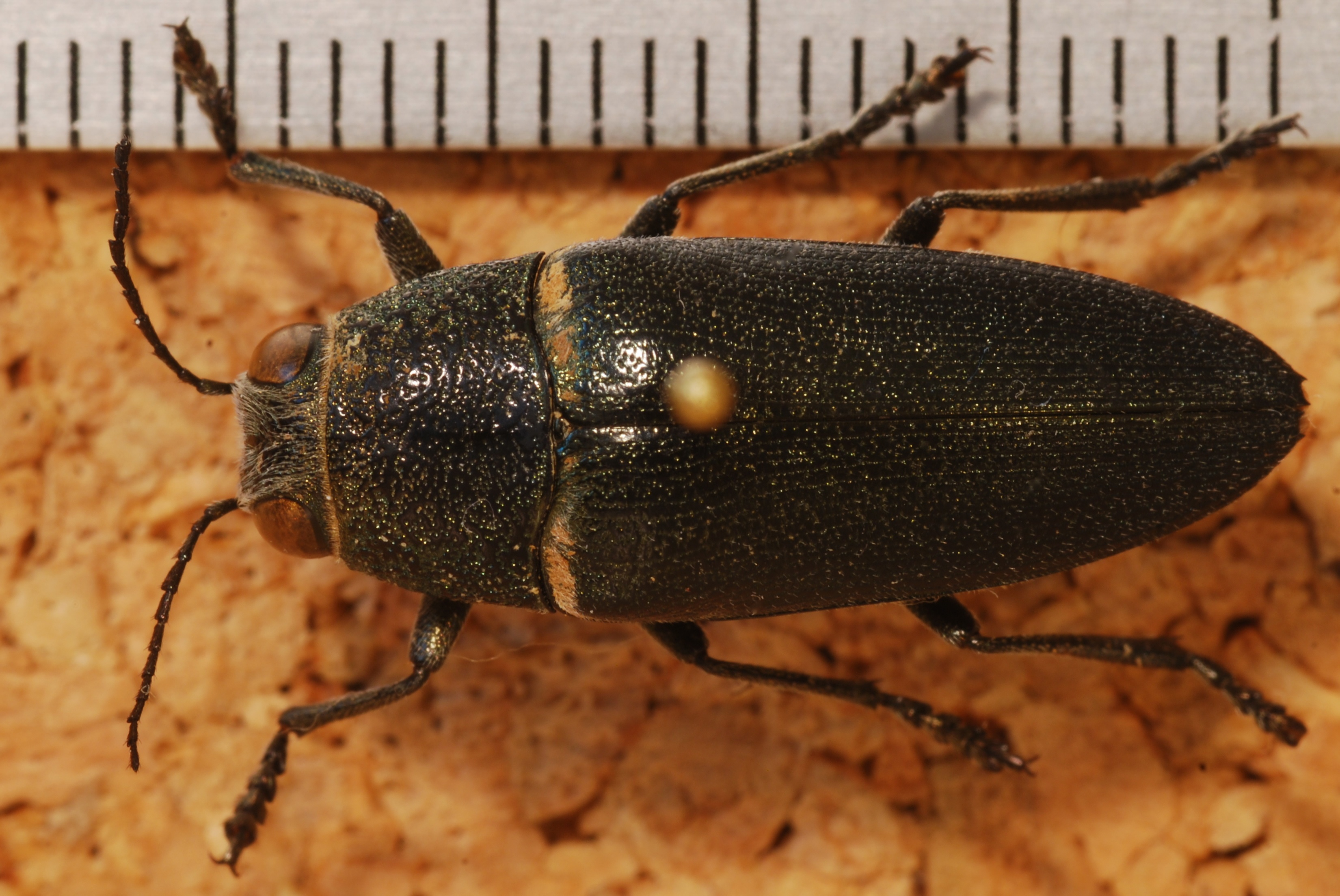 Madera Canyon, Pima County, Arizona, USA